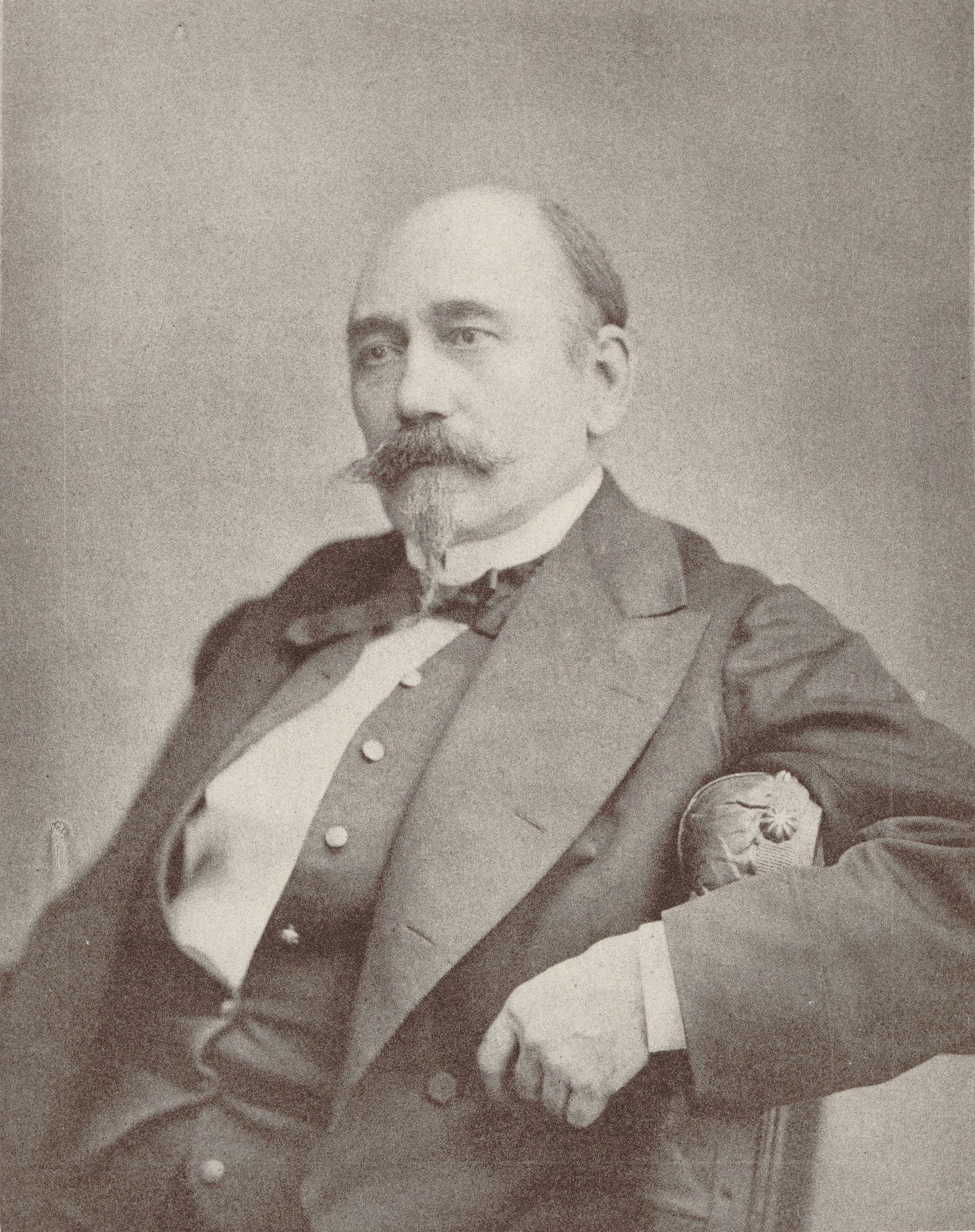 Louis Aimé Maillart (1817-1871), French composer